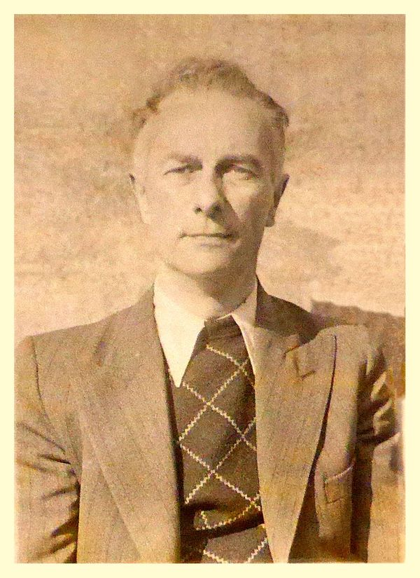 Lou Jansen, foto gevonden in het dossier van het NIOD